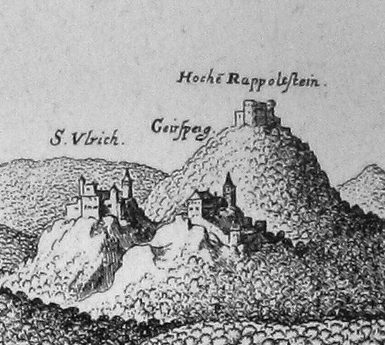 Ausschnitt aus Matthäus Merians Stich Rappoltsweyer in der Topographia Alsatiae mit den drei Burgen St. Ulrich, Girsberg und Hoch-Rappoltstein